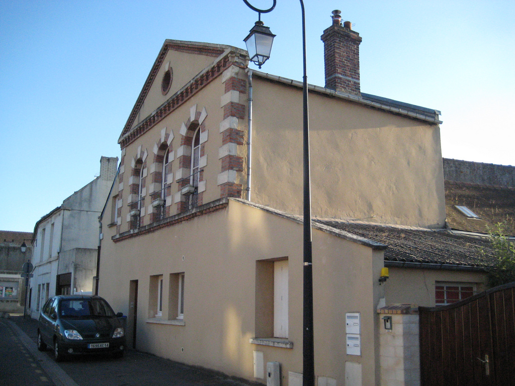 Ancienne mairie de Colombelles (14), rue de la République